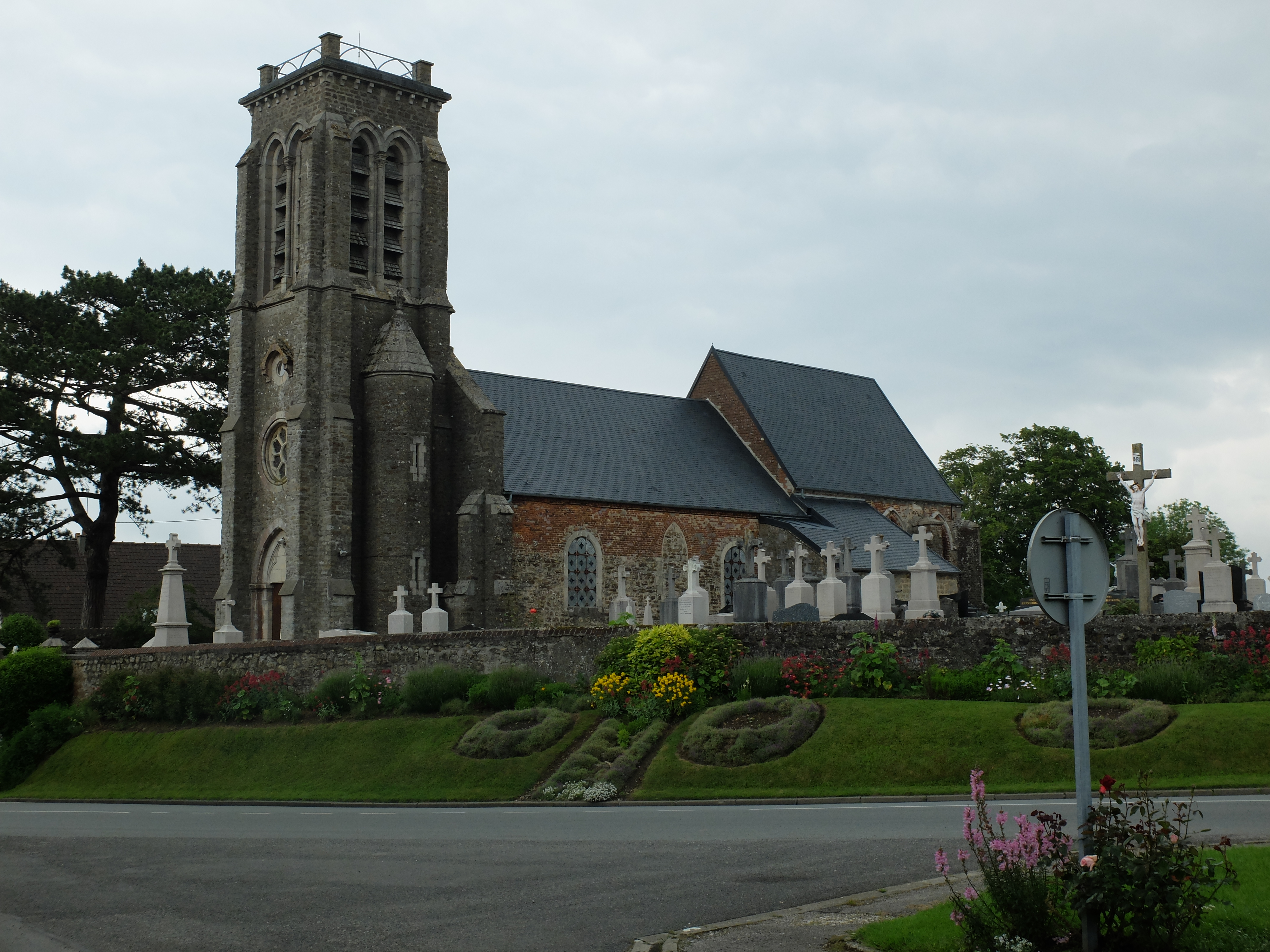 Vue de l'église Saint-Denis d'Alincthun.